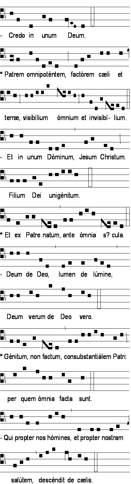 Credo III